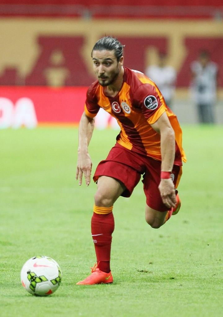 Tarık Çamdal eski takımı karşısında Galatasaray ile ilk maçına çıktı.